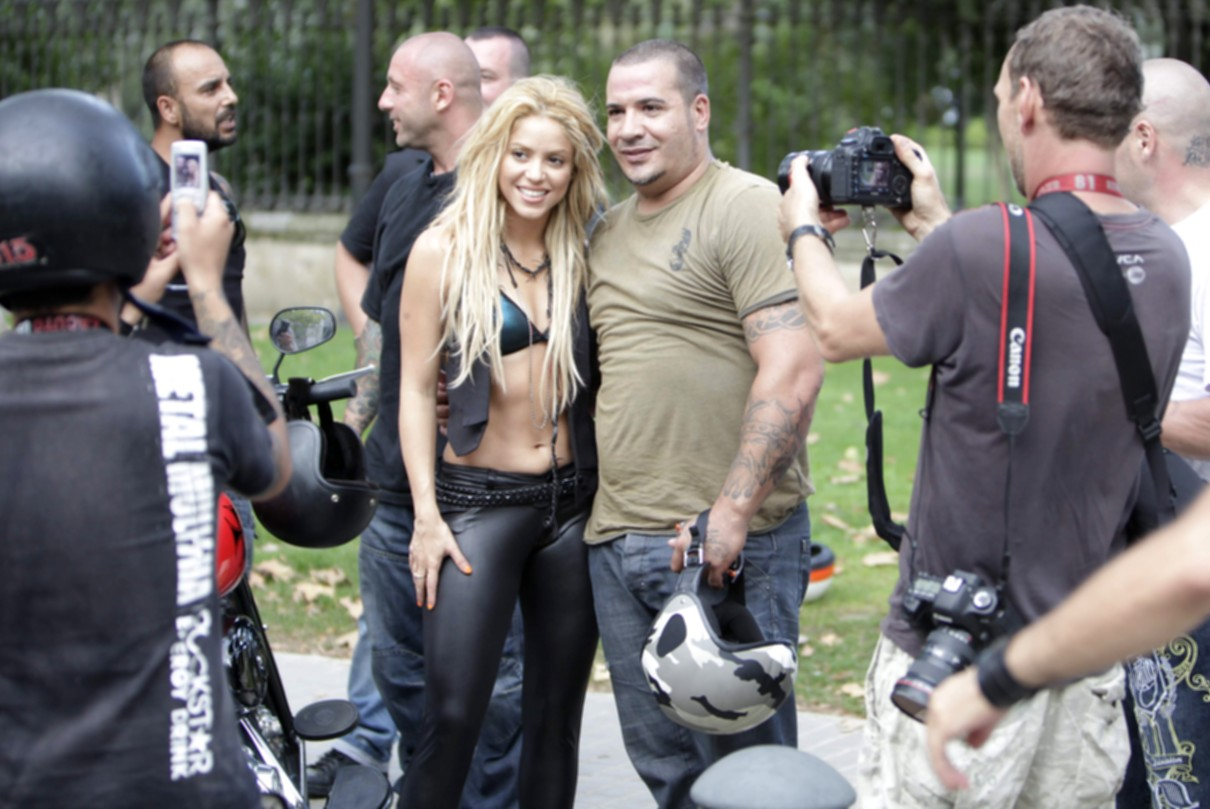 Shakira en Barcelona durante la filmación de Loca.